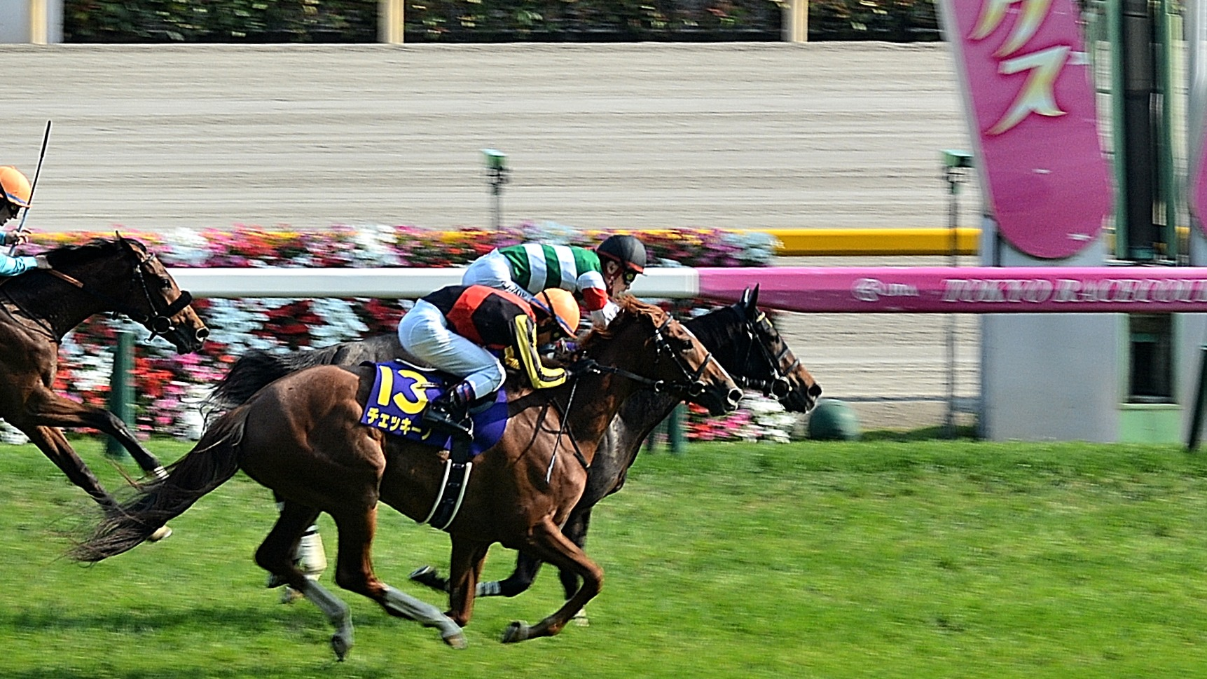 第77回優駿牝馬（オークス）でゴールする瞬間（2016年5月22日）